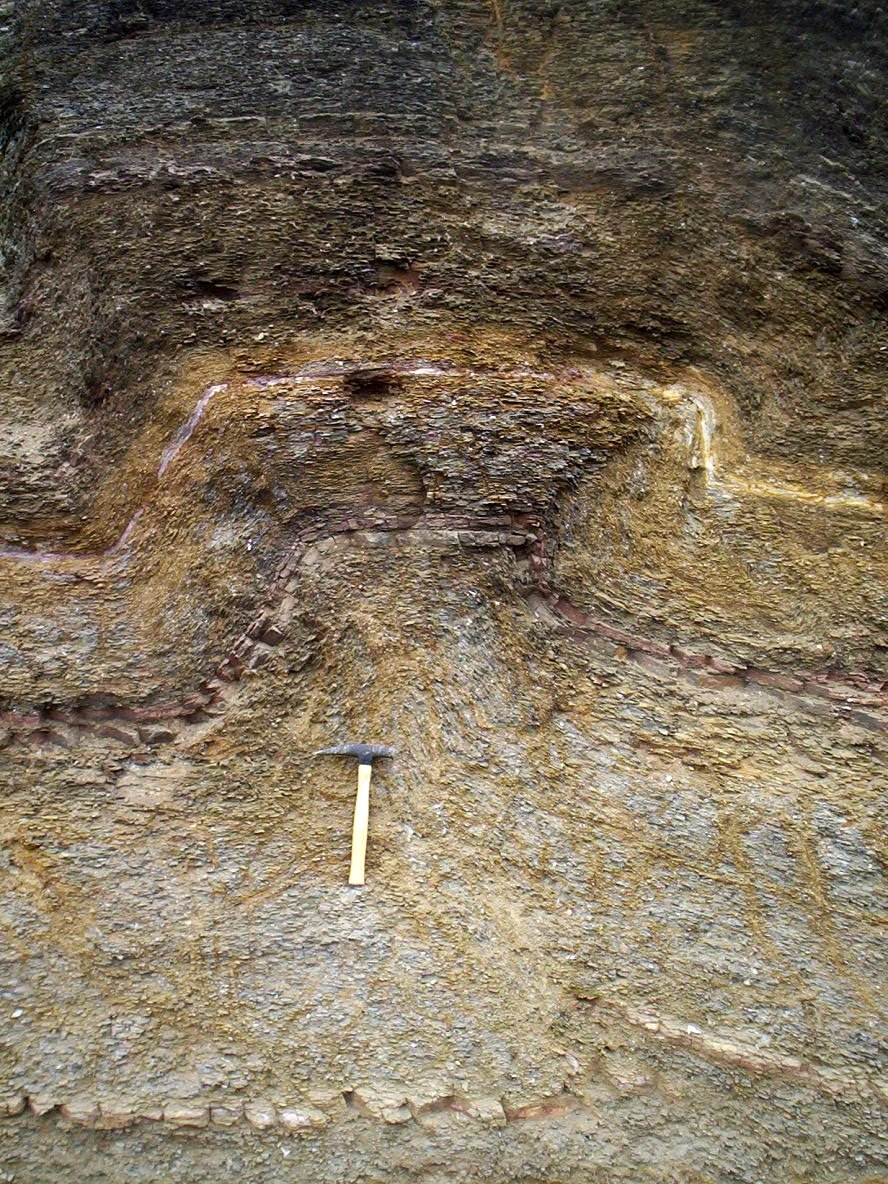 Pliegue en cofre, Morro Solar, Lima, Peru.